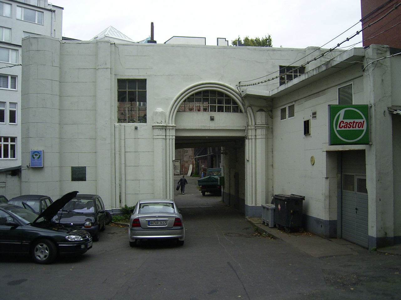 Der zweite Tempel (=Synagoge) des liberalen Neuen Israelitischen Tempel-Vereins in der Poolstraße 12/13 in der Hamburger Neustadt. Der Bau des Architekten Johann Hinrich Klees-Wülbern wurde 1842 bis 1844 errichtet und bis 1931 als Gotteshaus verwendet (Nachfolge: Neuer Tempel in der Oberstraße in Harvestehude). 1944 wurde das Gebäude durch einen Bombentreffer zerstört. Heute ist in der Ruine eine Autowerkstatt untergebracht. Artikel siehe Israelitischer Tempel Poolstraße. This is a photograph of an architectural monument.